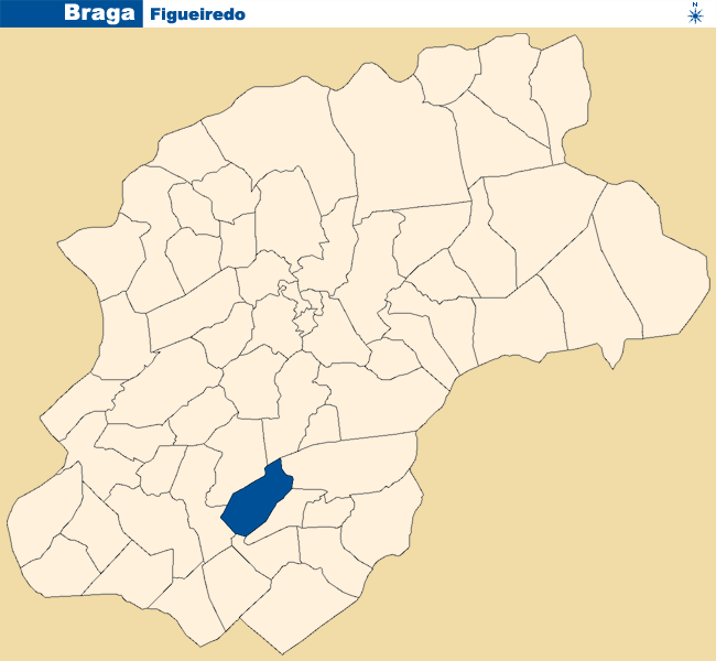 Localização de Figueiredo no concelho de Braga.